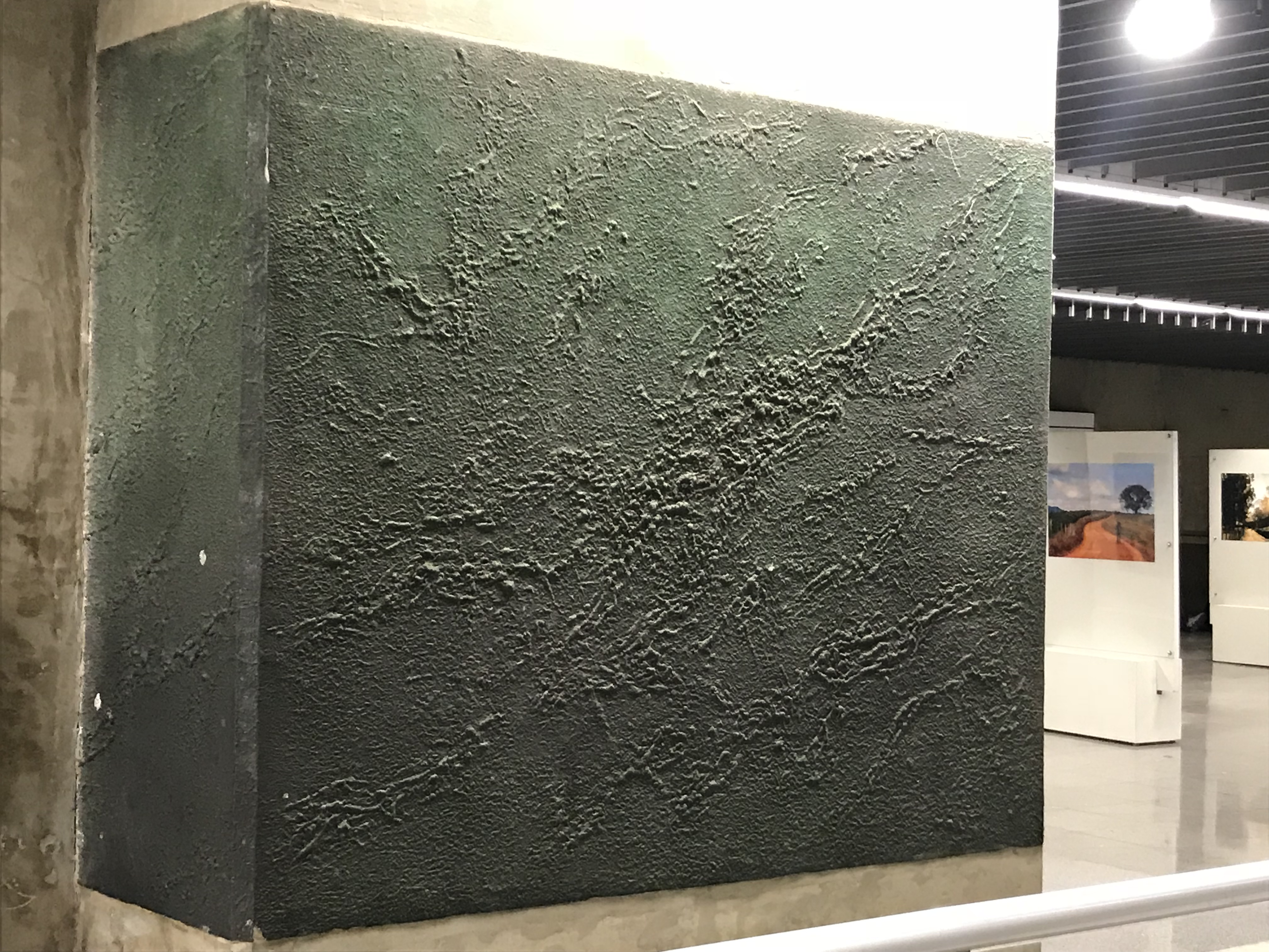 Obra "Século XXI - Resíduos e Vestígios - Luz da Matéria", por Xico Chaves, exposta na Estação República do metrô de São Paulo.